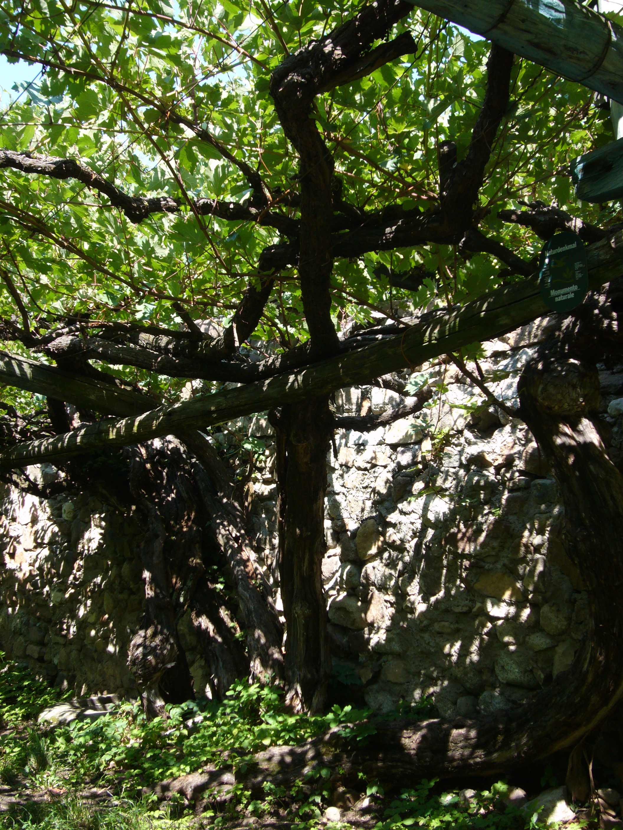 Versoaln Rebstock bei Schloss Katzenzungen Südtirol